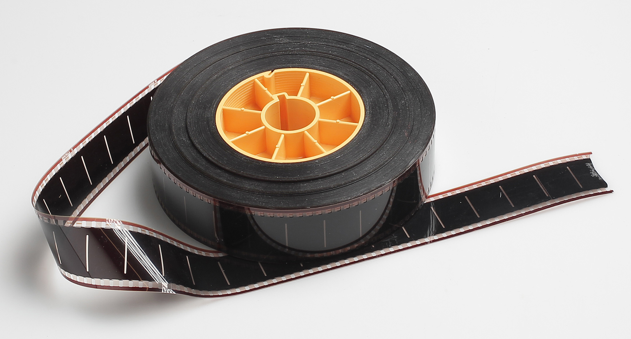 35mm film on spool